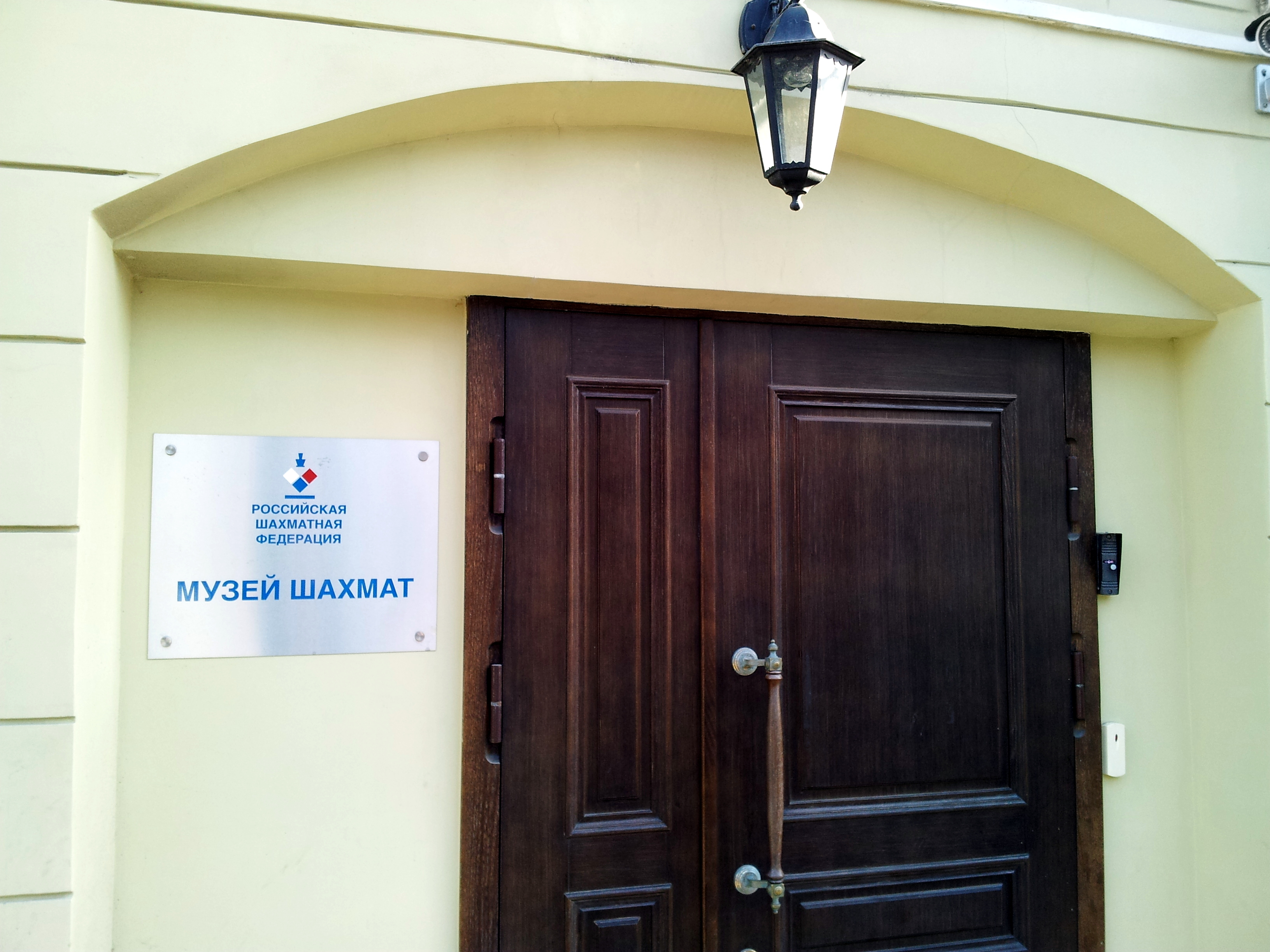 Здание музея шахмат Российской Шахматной Федерации в городе Москве на Гоголевском бульваре 14